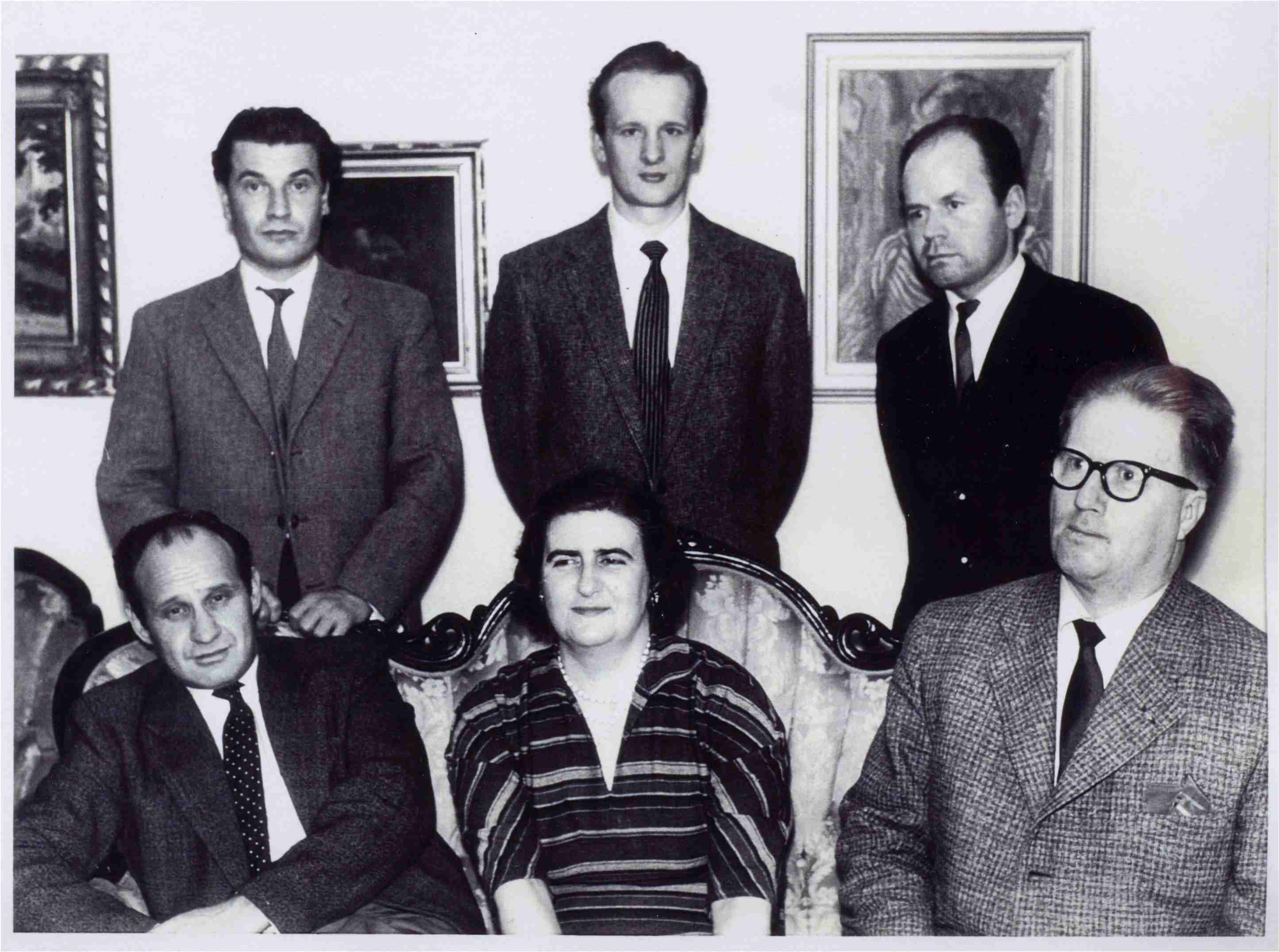 Pirkkalaiskirjailijat ry:n hallitus koolla marraskuun alussa 1958. Takarivissä vasemmalta Harri Kaasalainen, Jaakko Syrjä ja Veikko Pihlajamäki, jonka ehdotuksesta Linnan sotaromaani oli saanut nimekseen Tuntematon sotilas. Edessä vasemmalta Väinö Linna, Soile Kaukovalta-Perttunen ja Ilpo Kaukovalta. Linna toimi yhdistyksessä sekä sihteerinä että taloudenhoitajana.